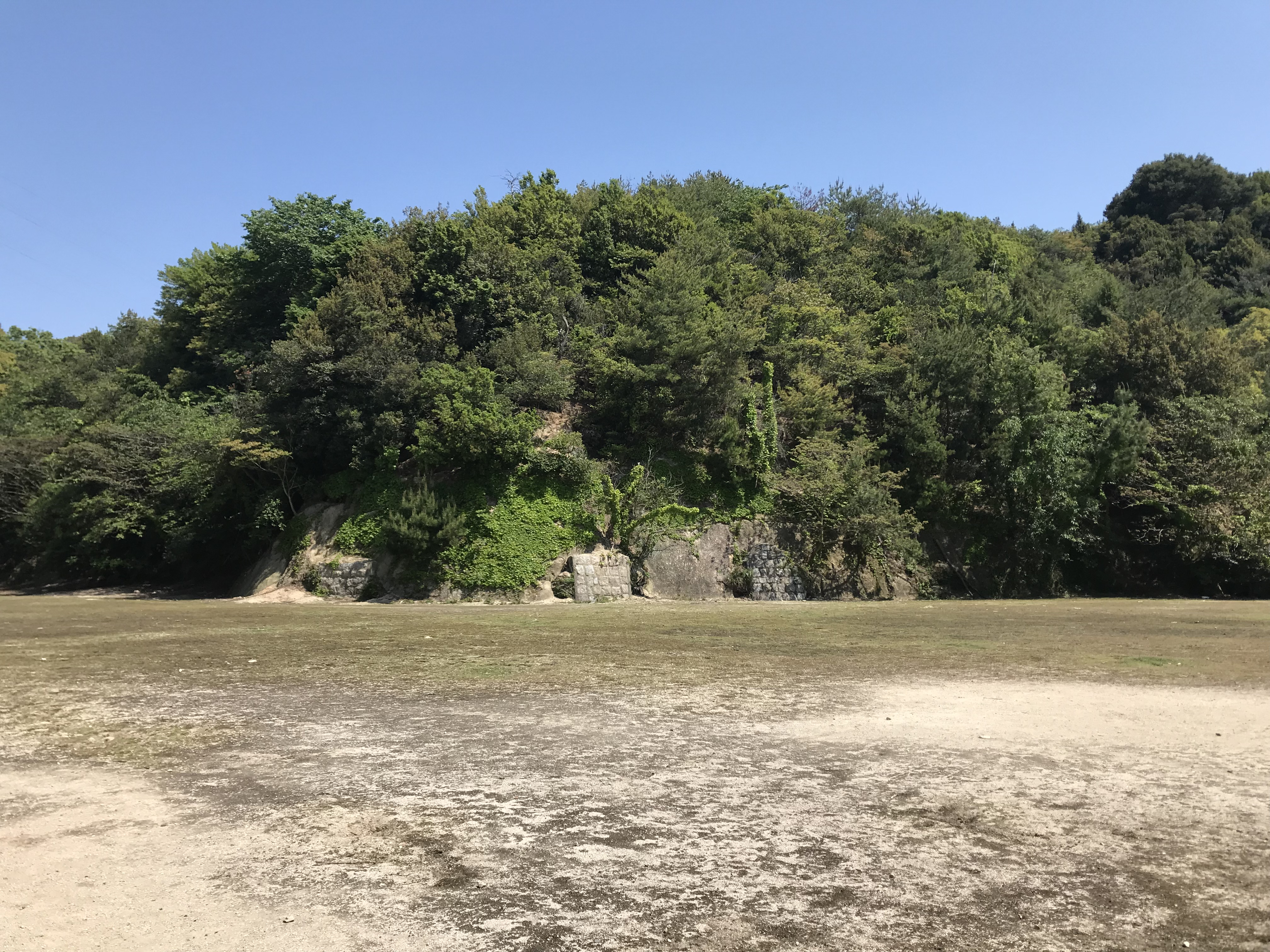 大久野島・南部探照灯跡付近